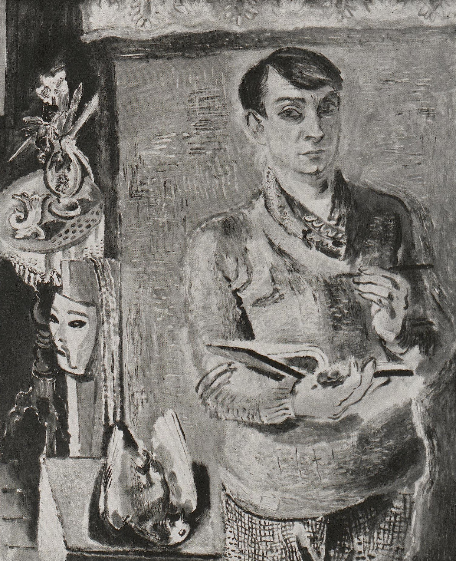 Selbstbildnis